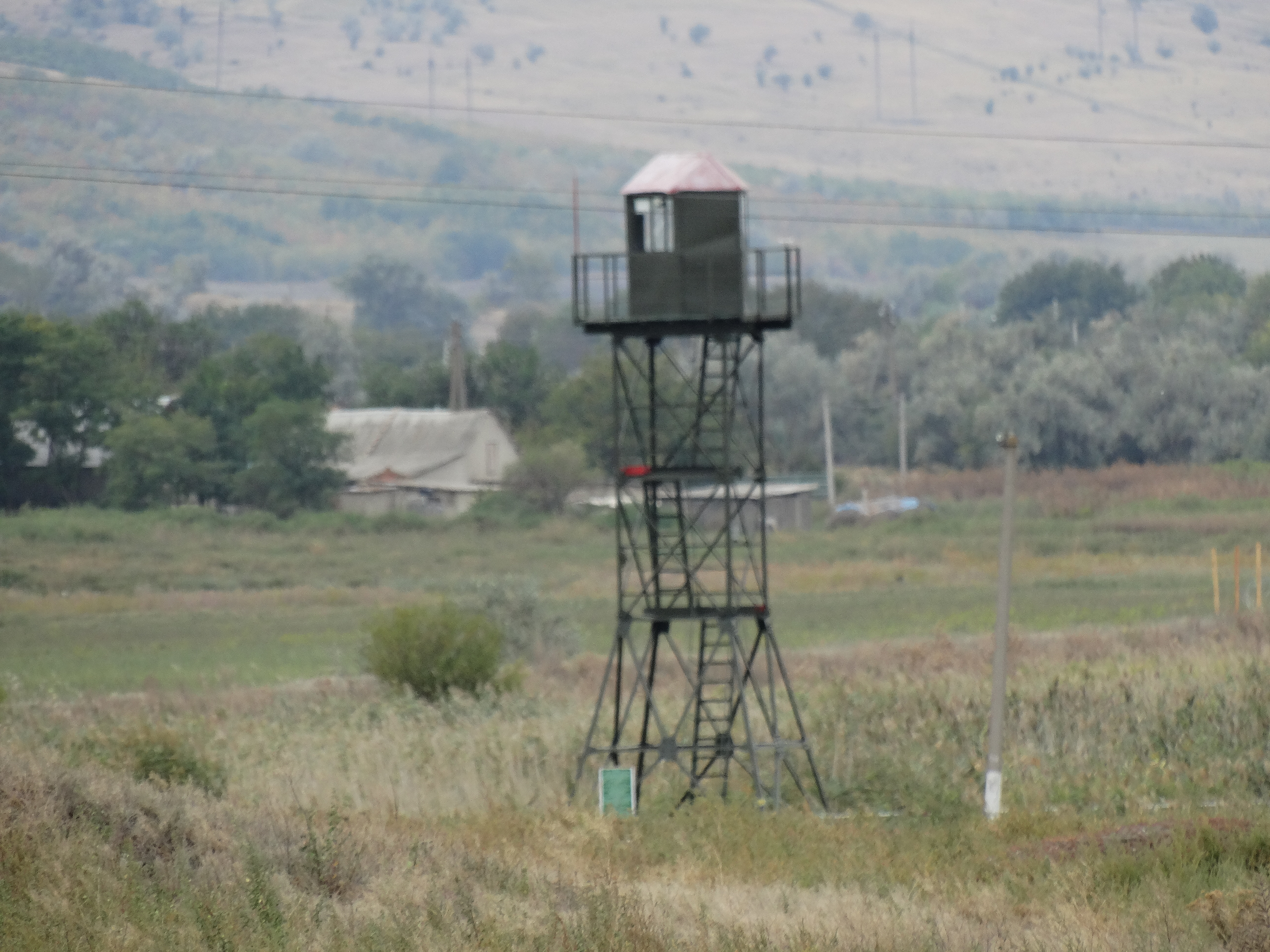 Пункт контролю Розалівка, на кордоні із Молдовою. Вікіекспедиція на Північ Одещини